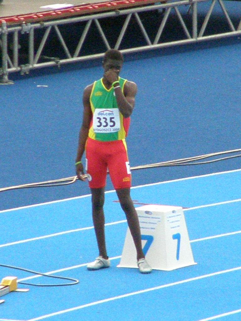 Mistrzostwa Świata Juniorów w Lekkoatletyce - Bydgoszcz 2008 - Kirani James